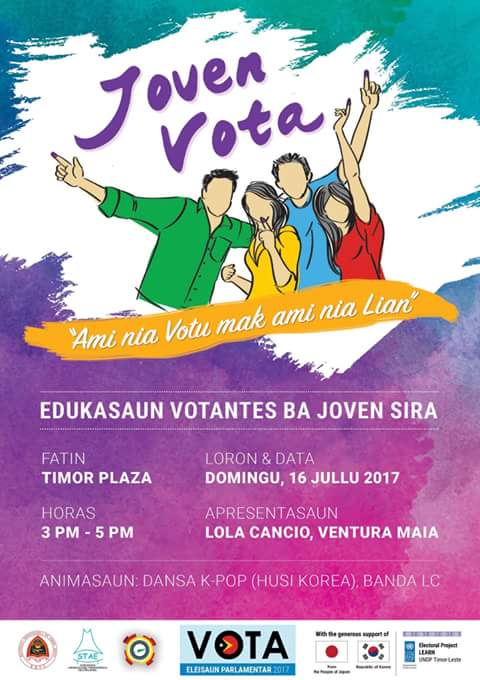 Plakat des Secreteriado Técnico de Administração Eleitoral mit dem Aufruf an die Jugend zur Teilnahme an den Parlamentswahlen 2017.